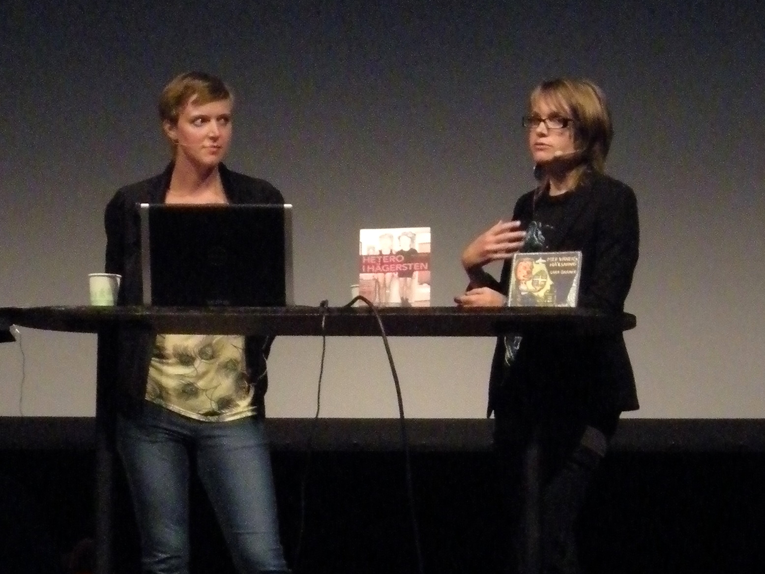 Johannes Klenell, Sara Granér och Sofia Olsson från Galago på Peace and Love i Borlänge 2010.